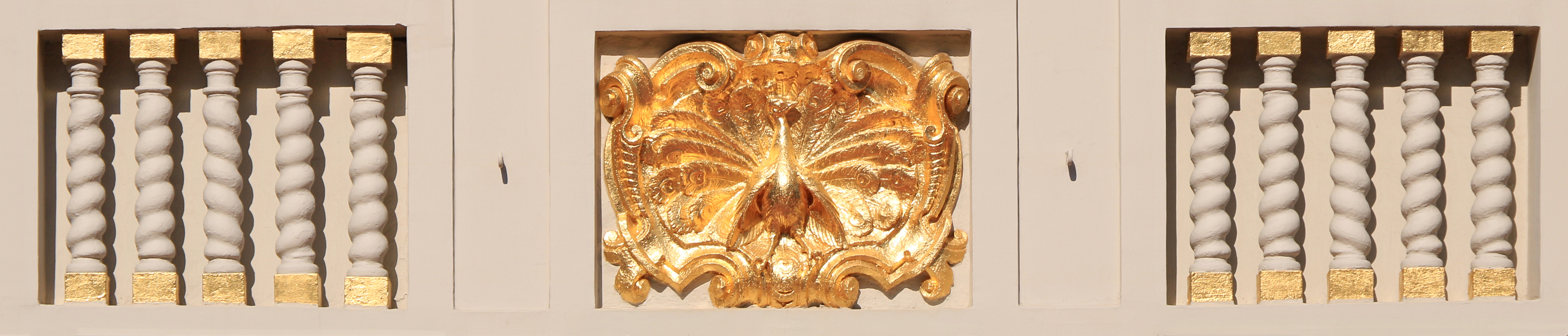 Belgique - Bruxelles - Grand-Place n° 35 - Maison du Paon This photo of immovable heritage has been taken in the Brussels Capital Region